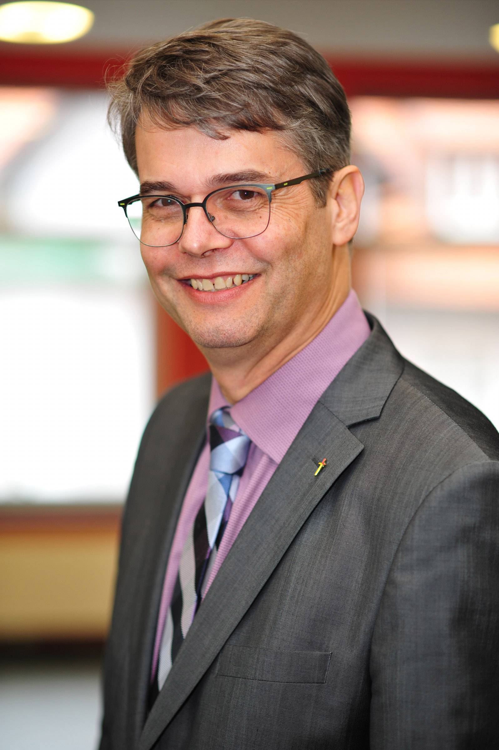 Wolfgang Rehner am Tag seiner Wahl zum Superintendenten der Steiermark.